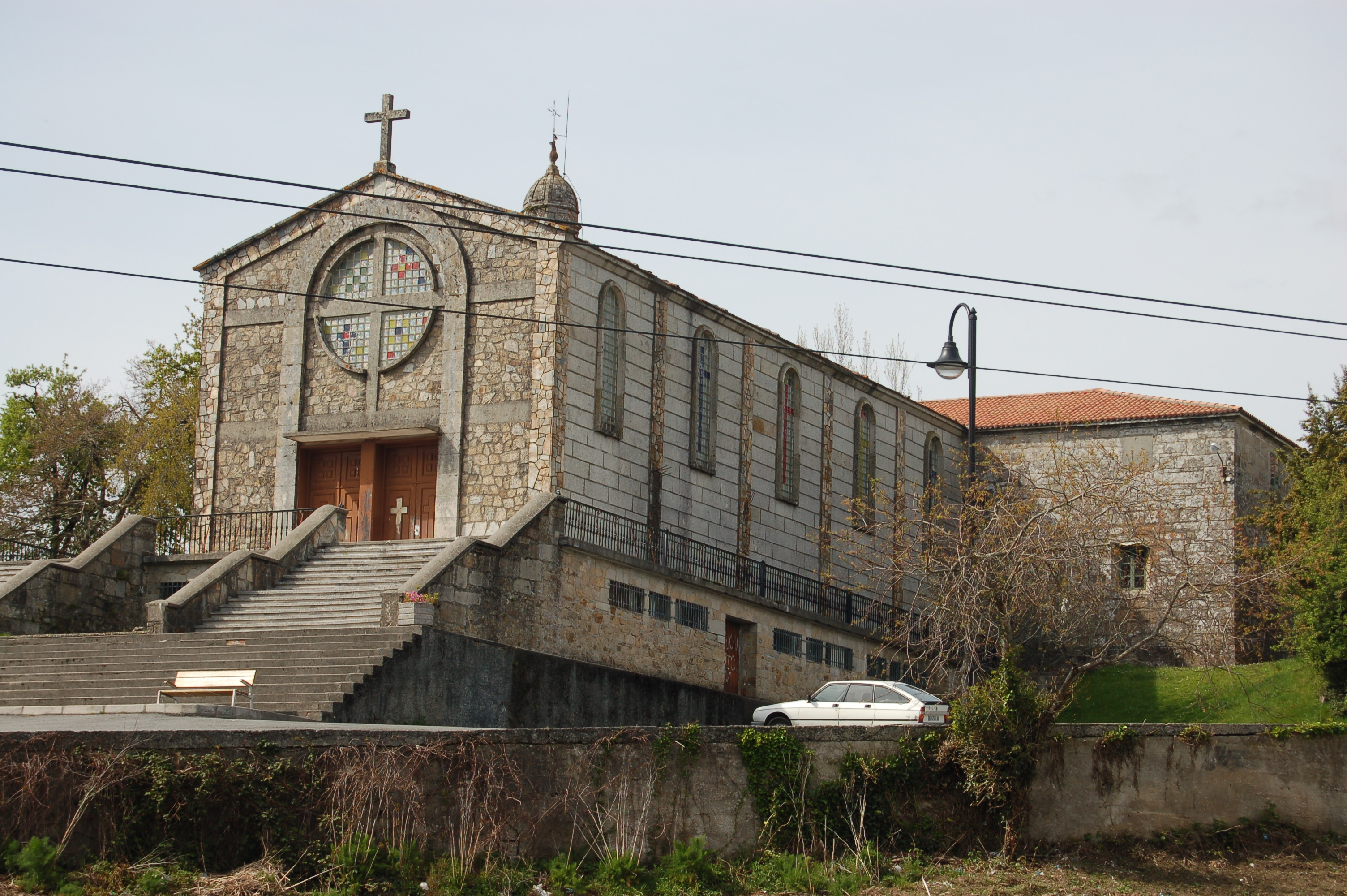 igrexa parroquial de San Martiño de Forcarei (Forcarei)